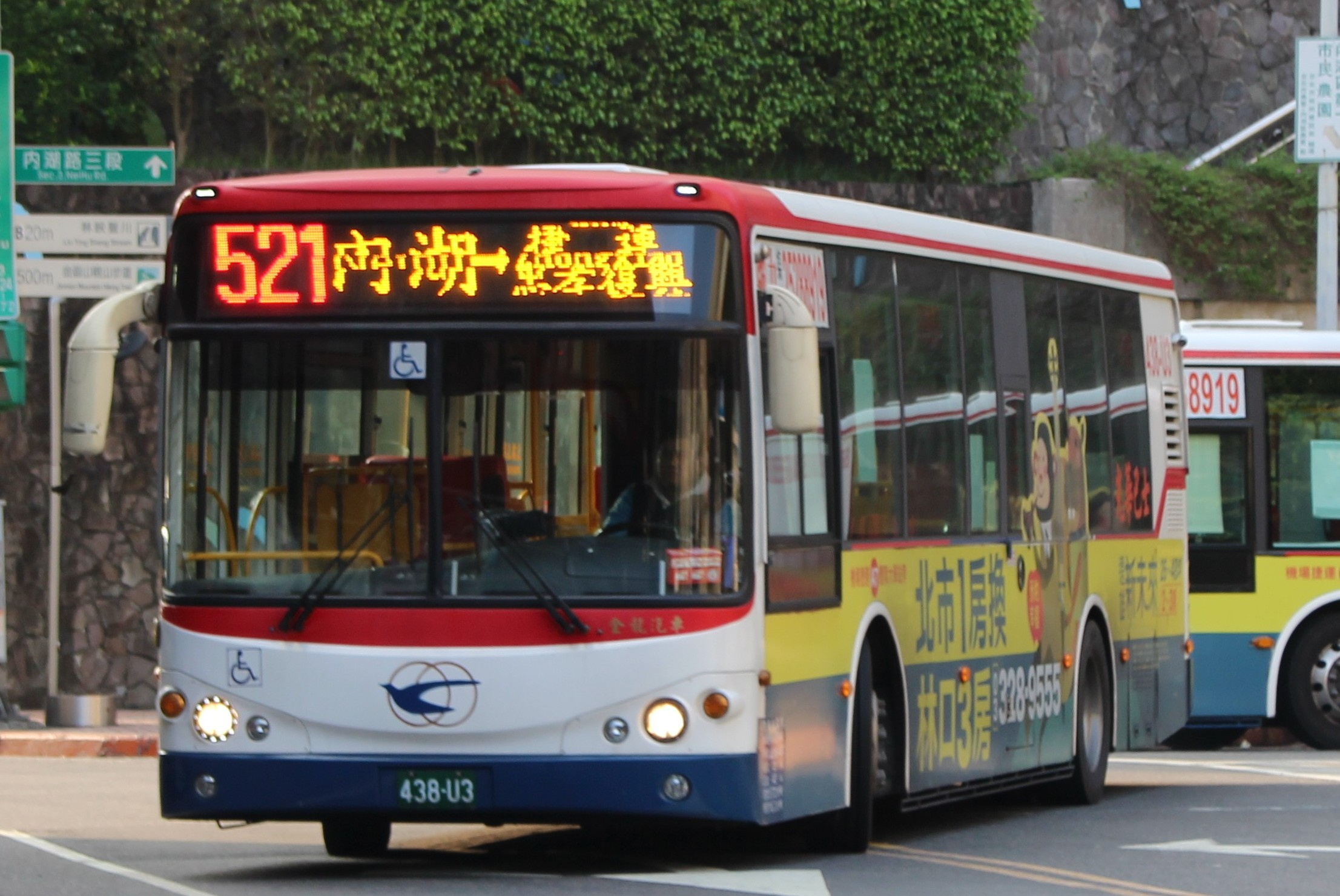 光華巴士438-U3 521